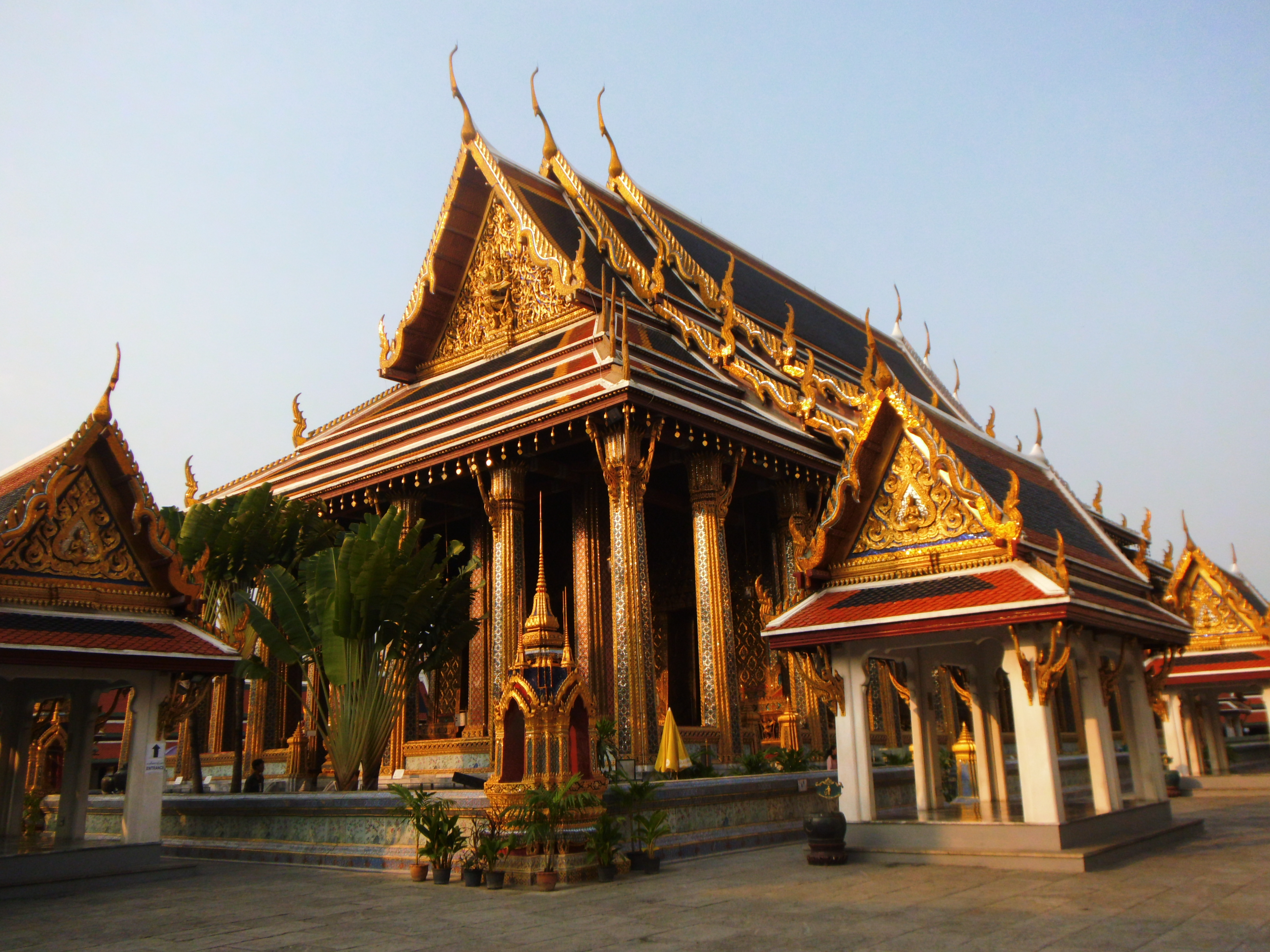 พระบรมมหาราชวังและวัดพระศรีรัตนศาสดาราม